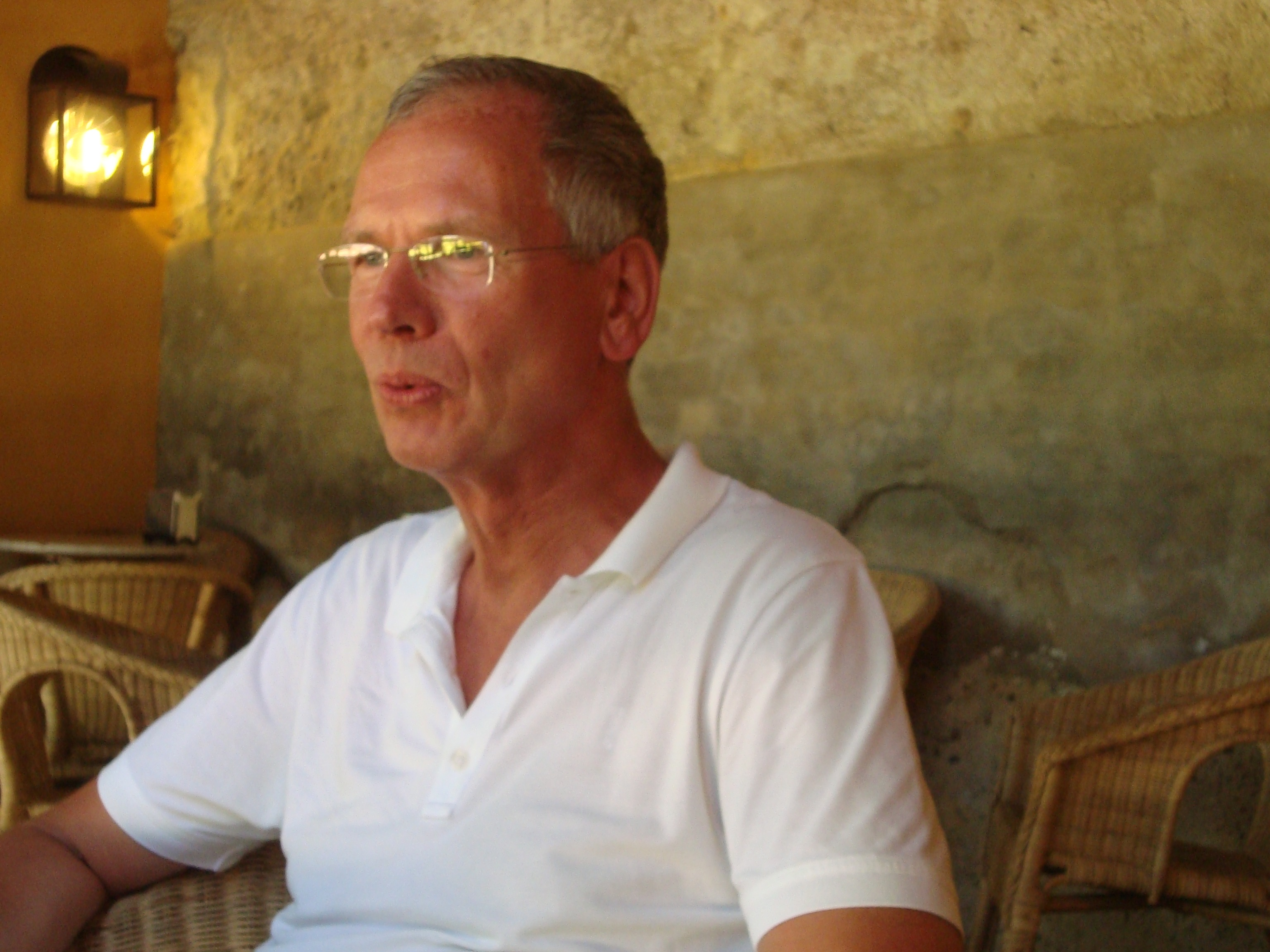 Privatfoto von Stefan Bollmann